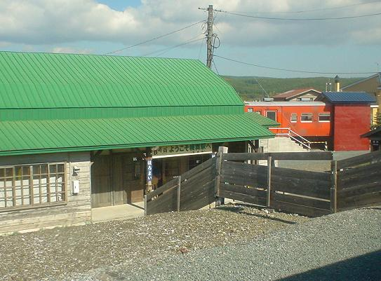 JR Hokkaido Ikutora Station, Minamifurano, Hokkaido, Japan 根室本線ja:幾寅駅駅舎（北海道南富良野町）